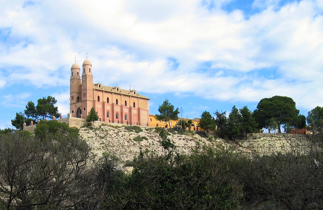 ermita del Santo Cristo del Consuelo, Cieza, Murcia, España